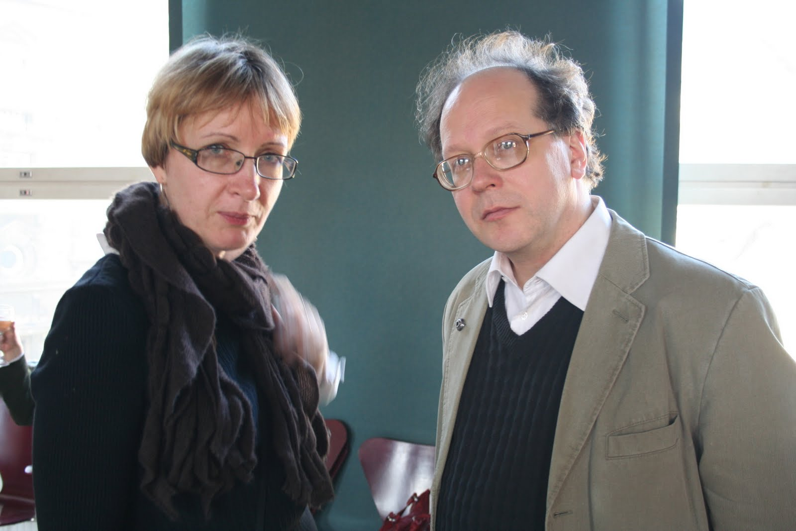 Marin Laak ja Jaan Undusk Eesti Kirjanike Liidu üldkogul 2011. aastal.